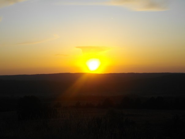 Couché de soleil. Photo prise depuis le plateau de Zamur, à Dessia.